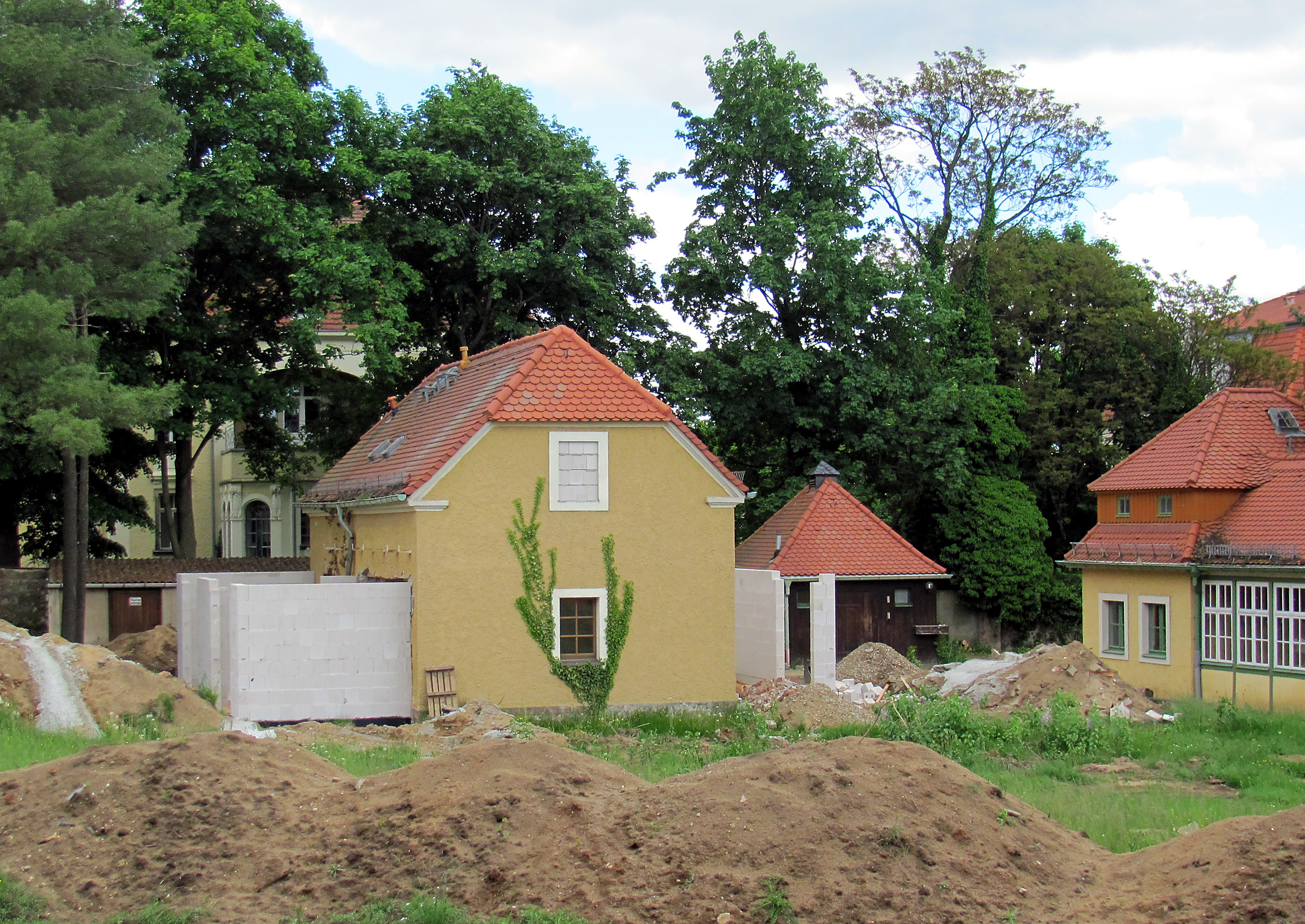 Radebeul-Niederlößnitz, Haus Salem, Nebengebäude